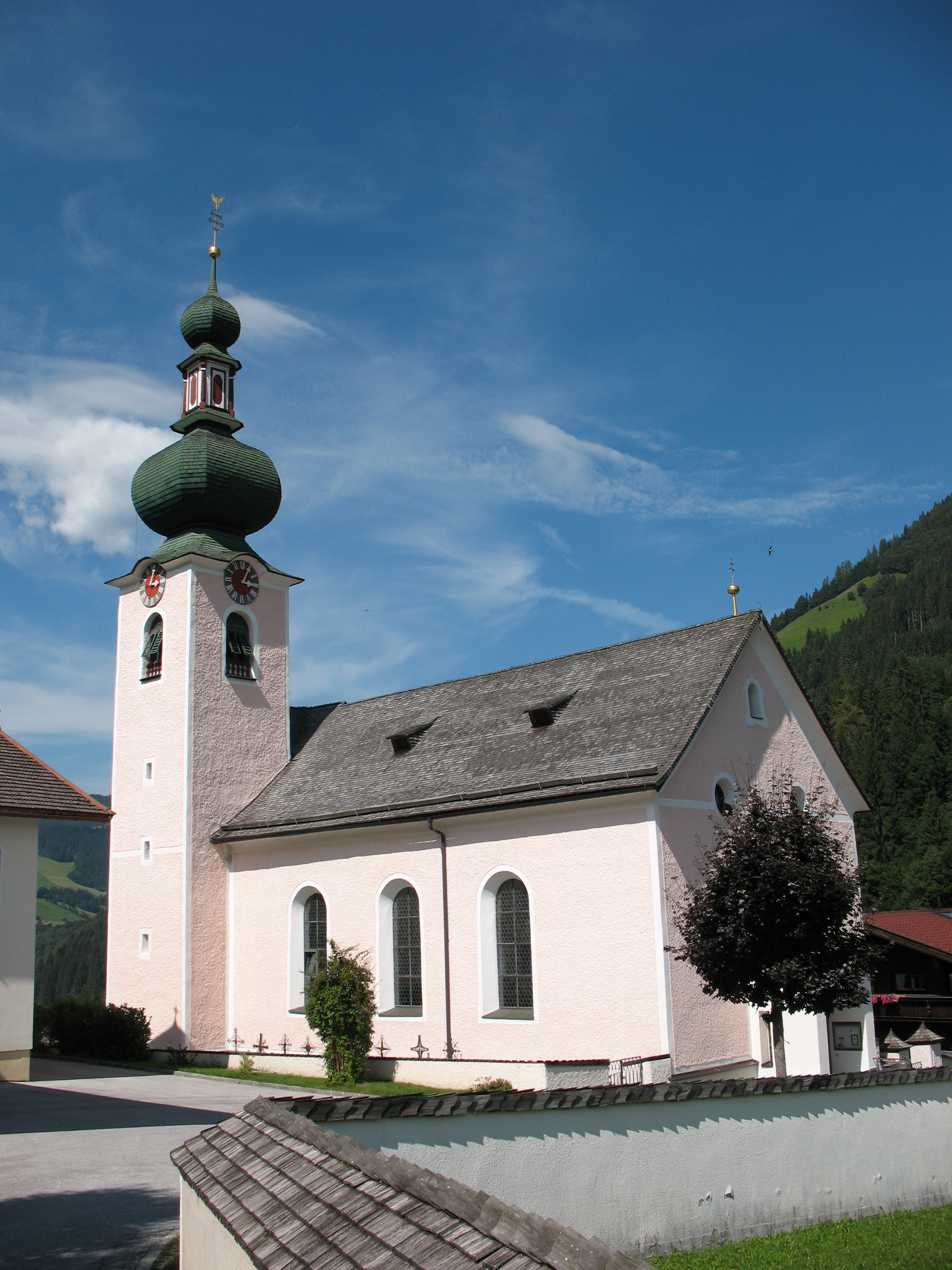 Kath. Pfarrkirche hl. Nepomuk und Friedhof